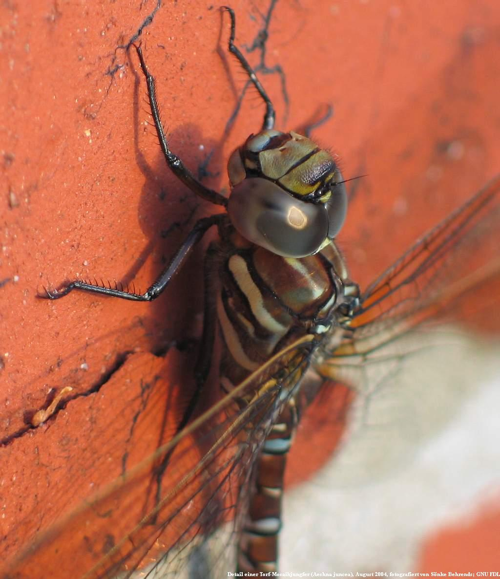 Detail einer Torf-Mosaikjungfer (Aeshna juncea), fotografiert im August 2004 von soebe. Titel: Detail einer Torf-Mosaikjungfer Foto: soebe, 28.08.2004 (Original text: Diese Edellibelle ist mir am späten Nachmittag aufgefallen, als sie jagend ihre Kreise zog und einmal kurz auf einem Holzzaun landete, mir aber keine Gelegenheit für ein Foto gab. Abends sass das Tier dann an einer Hauswand und sonnte sich in der Abendsonne und ließ sich ablichten. Auch noch dieses Detailfoto konnte ich machen. Die Fotos entstanden am Vorabend zur 8. Europäischen Fledermausnacht in Bad Segeberg an einem Haus neben dem Kalkberg. Das Foto von dem ganzen Tier findet Ihr hier.) Afbeelding:Aeshna juncea Detail.jpg